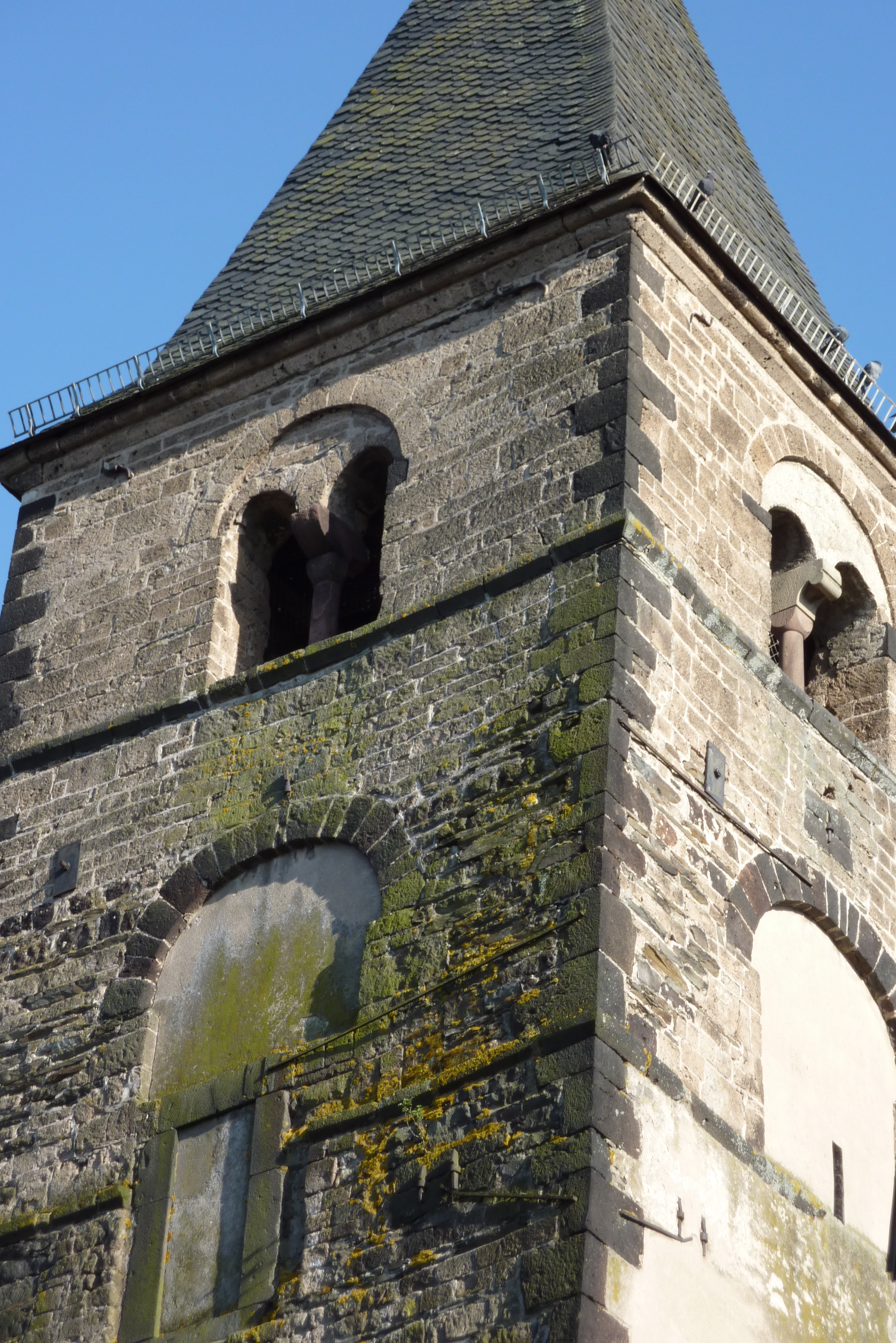 Kirchturm (12. Jahrhundert) einer nicht mehr existierenden Kirche in Miesenheim